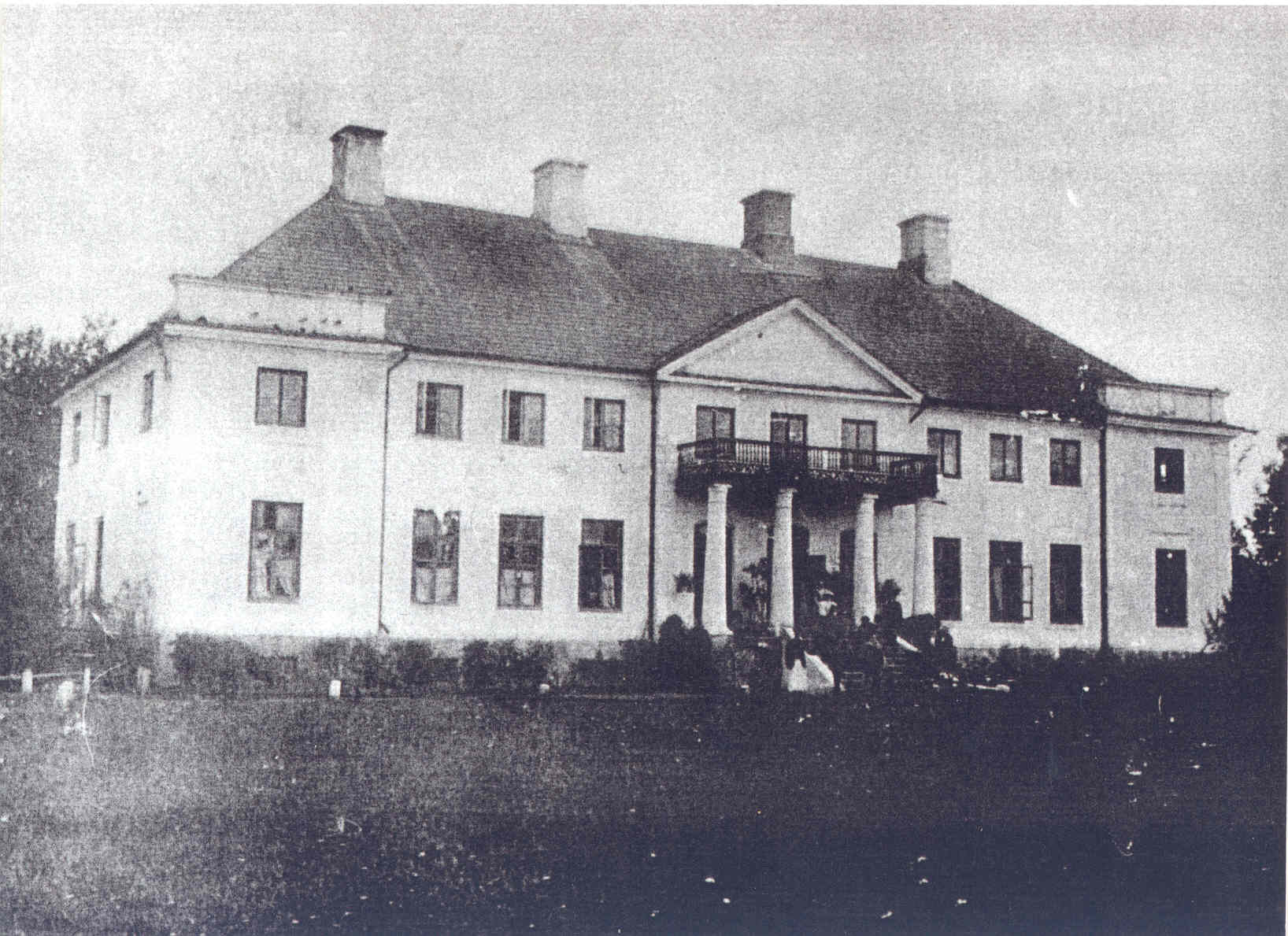 Sargvere mõis 20. sajandi alguses